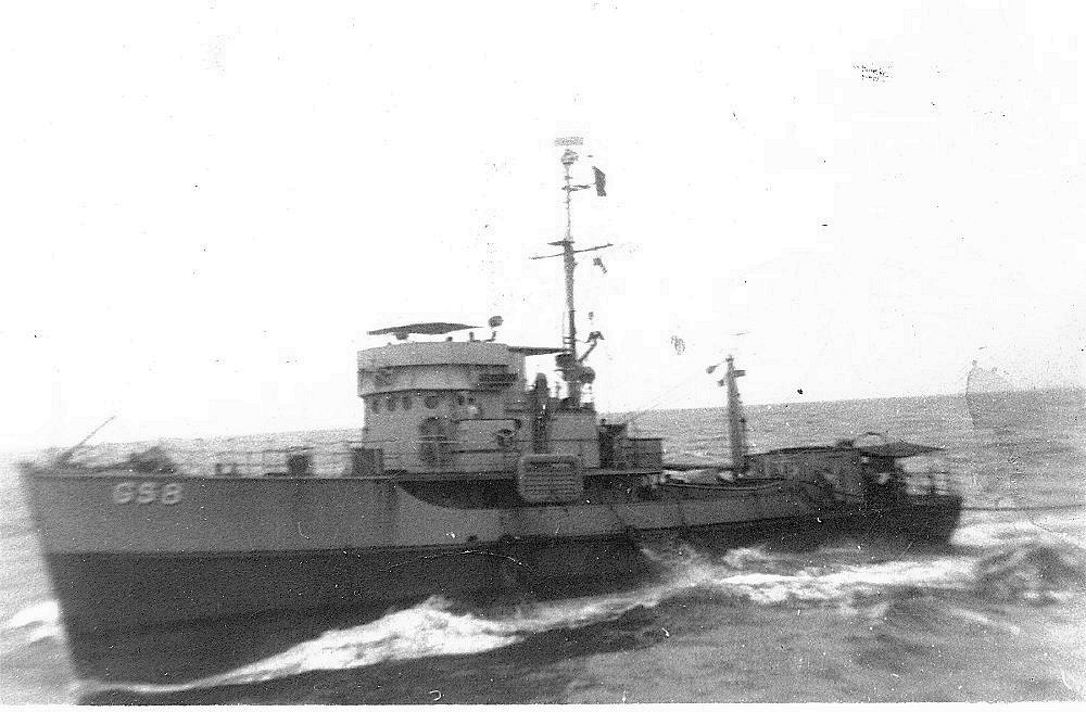 USS Dutton (AGSC-8)